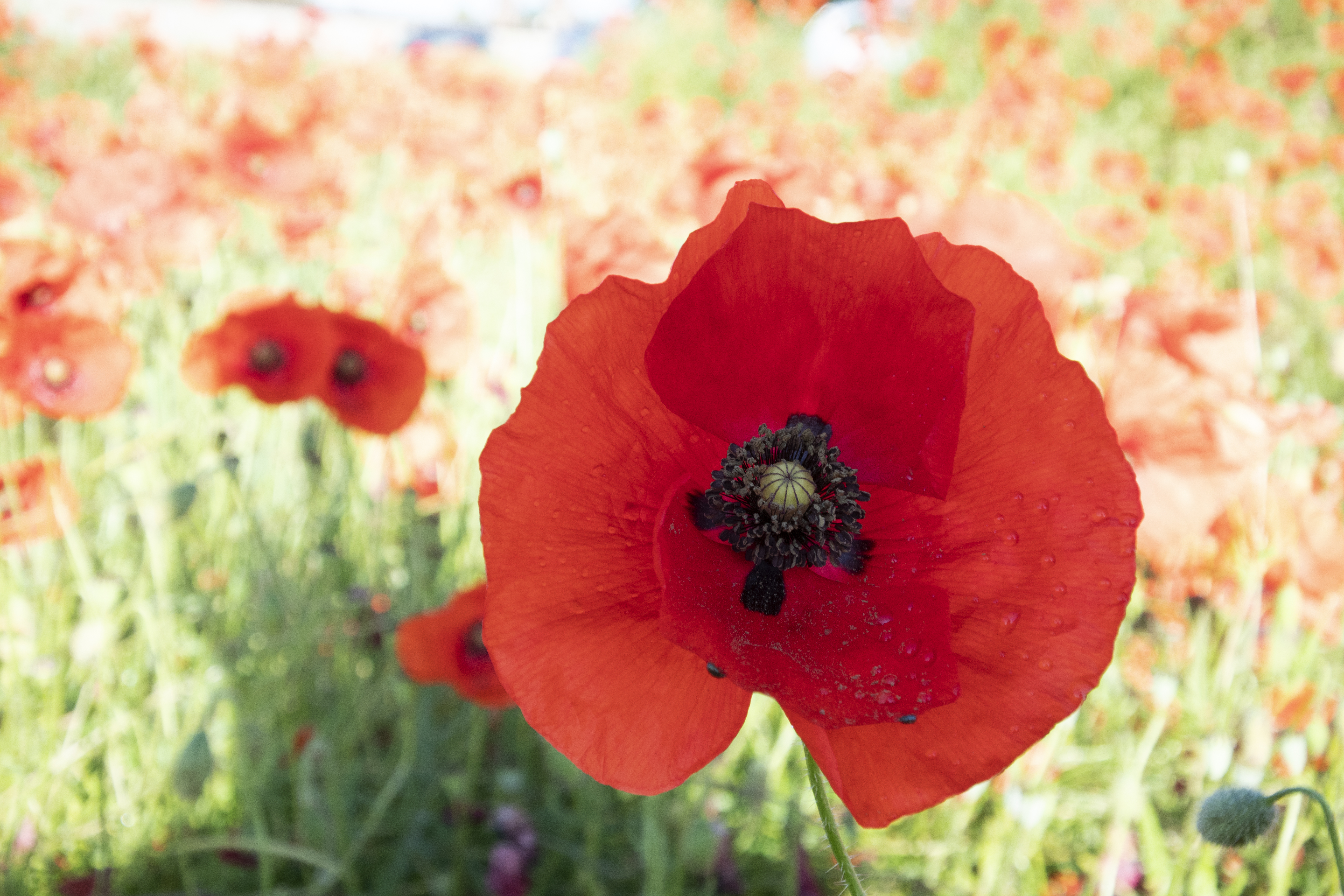 Les fleurs comportent quatre pétales un peu froissés de couleur rouges.